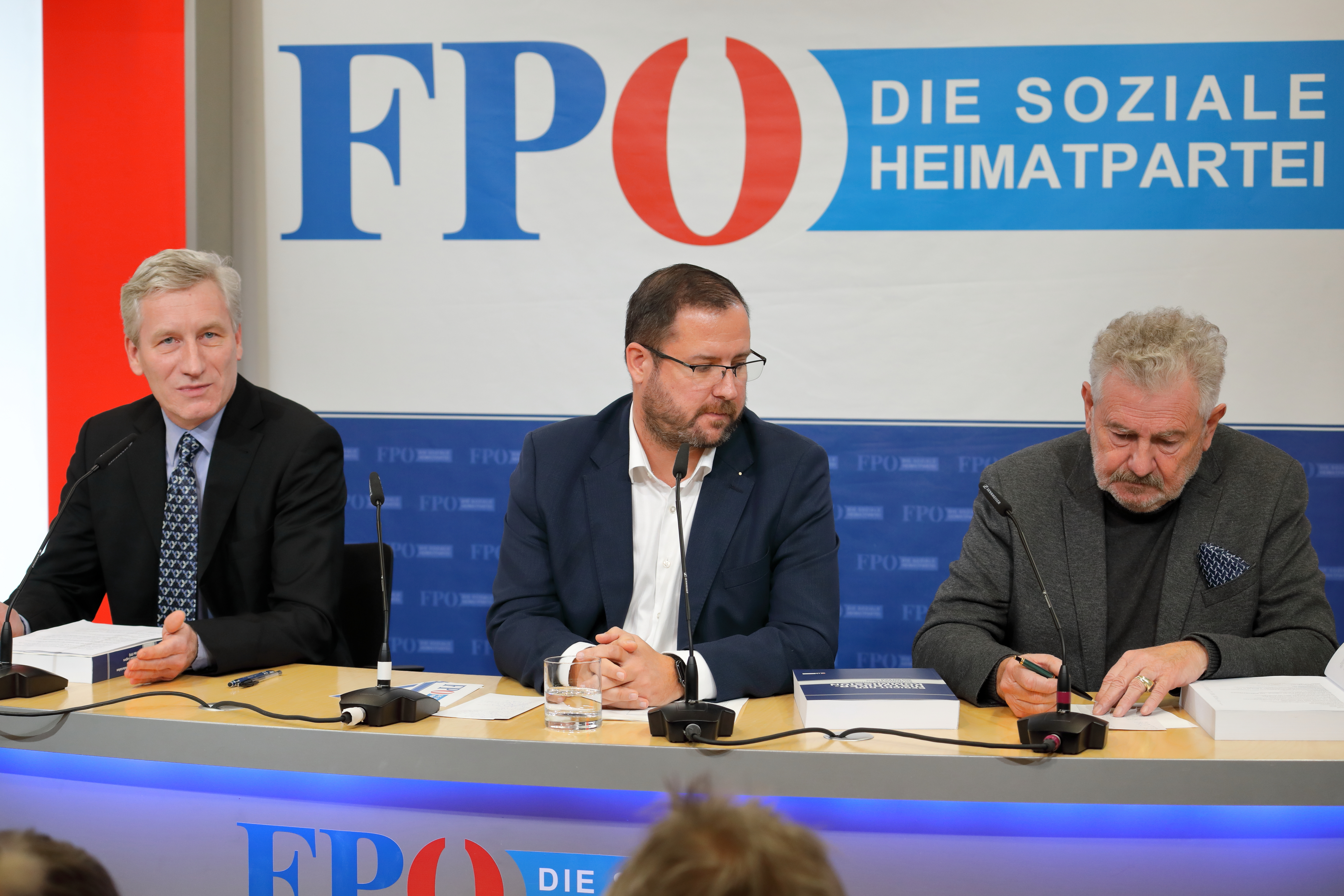 Pressekonferenz bezüglich der Veröffentlichung des Endberichtes der Historikerkommission am 23. Dez. 2019 im Wiener FPÖ-Medienzentrum (Doblhoffgasse 3) mit dem FPÖ-Generalsekretär NAbg. Christian Hafenecker, dem Koordinator der Historikerkommission Andreas Mölzer und dem Historiker Thomas Grischany.